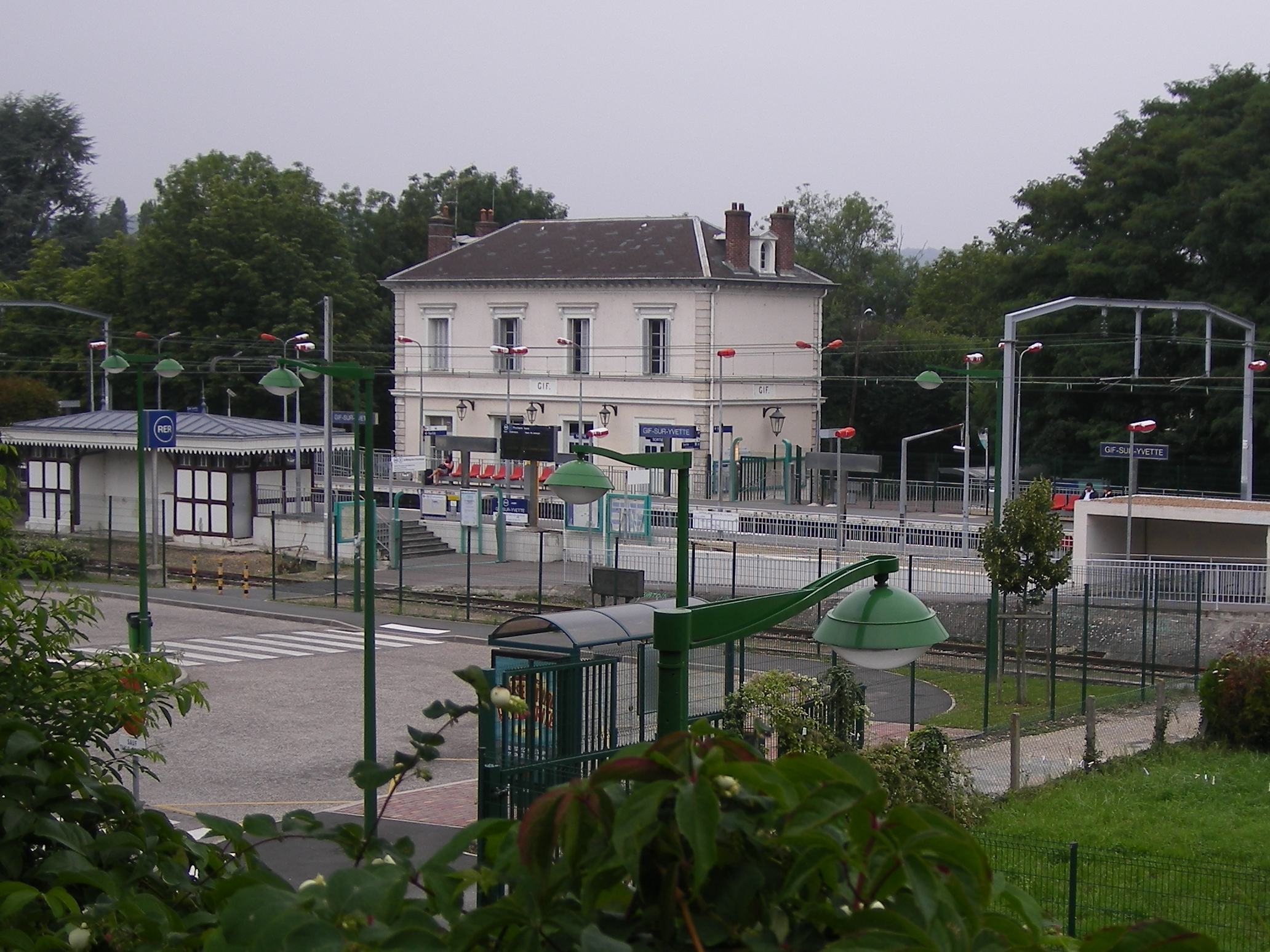 Gare de Gif-sur-Yvette vue depuis le sud.